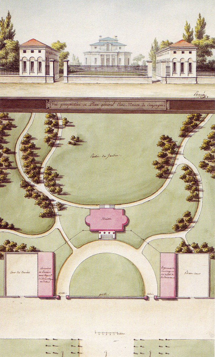 Joseph Ramée (1764-1842), Architekt: Entwurf für ein Landhaus in Gotha (nicht ausgeführt); perspektivische Ansicht und Lageplan.